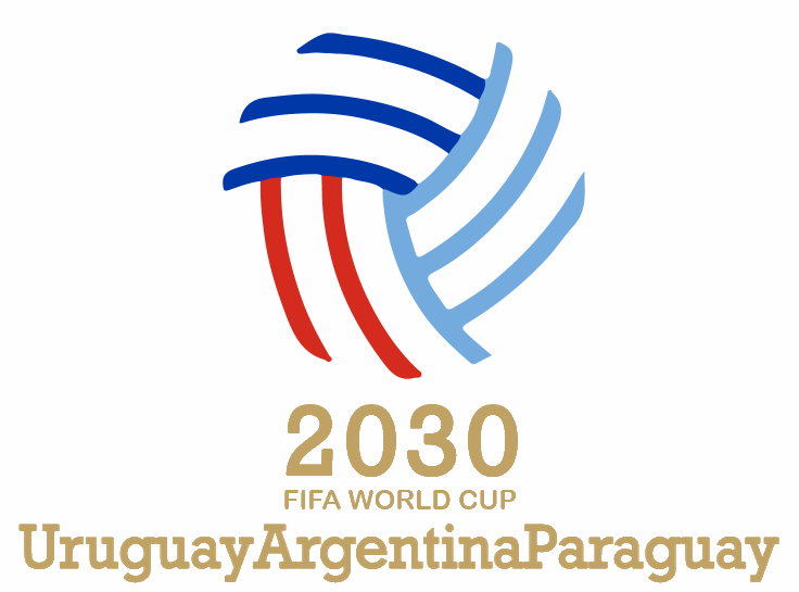 Logo representativo de la candidatura